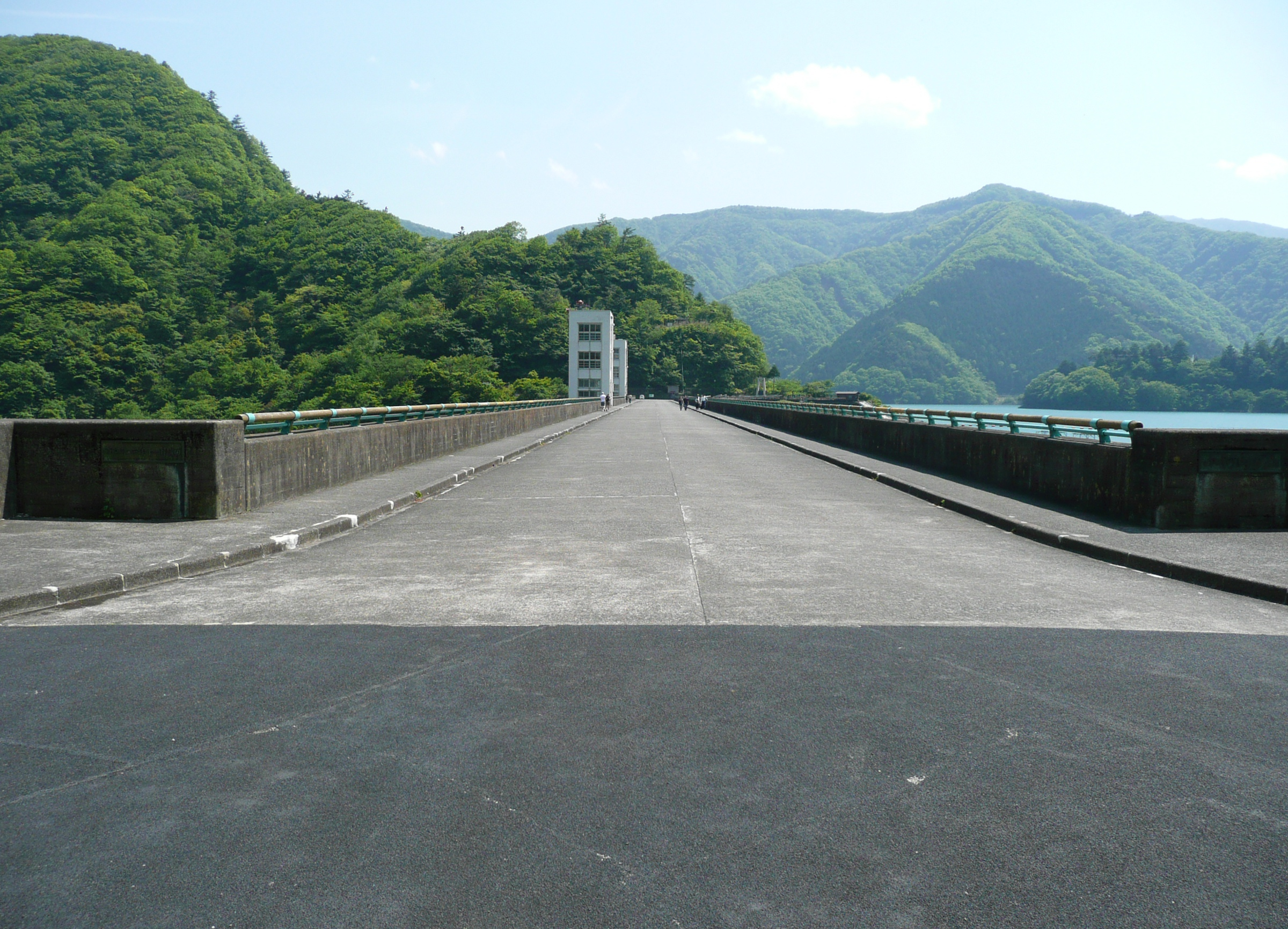 小河内ダムの天端。東京都道205号水根本宿線が通る。